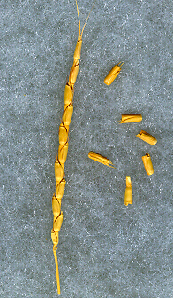 blé de genre Aegilops, Aegylops tauschii Original text: Aegilops tauschii Germplasm Resources Information Network (GRIN)